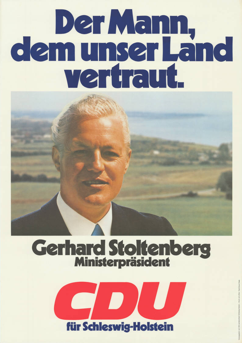 Der Mann, dem unserr Land vertraut. Gerhard Stoltenberg Ministerpräsident CDU für Schleswig-Holstein Abbildung: Porträtfoto vor Küstenlandschaft Plakatart: Kandidaten-/Personenplakat mit Porträt Auftraggeber: CDU-Landesverband Schleswig-Holstein Drucker_Druckart_Druckort: Druck und Lithos: Frank Druck, Preetz Objekt-Signatur: 10-012 : 351 Bestand: Landtagswahlplakate Schleswig-Holstein (10-012) GliederungBestand10-18: Landtagswahlplakate Schleswig-Holstein (10-012) » CDU Lizenz: KAS/ACDP 10-012 : 351 CC-BY-SA 3.0 DE